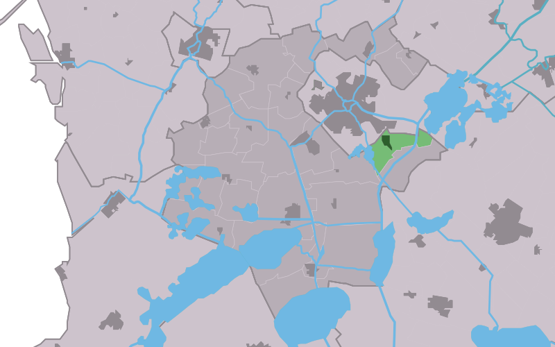 Kaartsje fan himrik fan Toppenhuzen